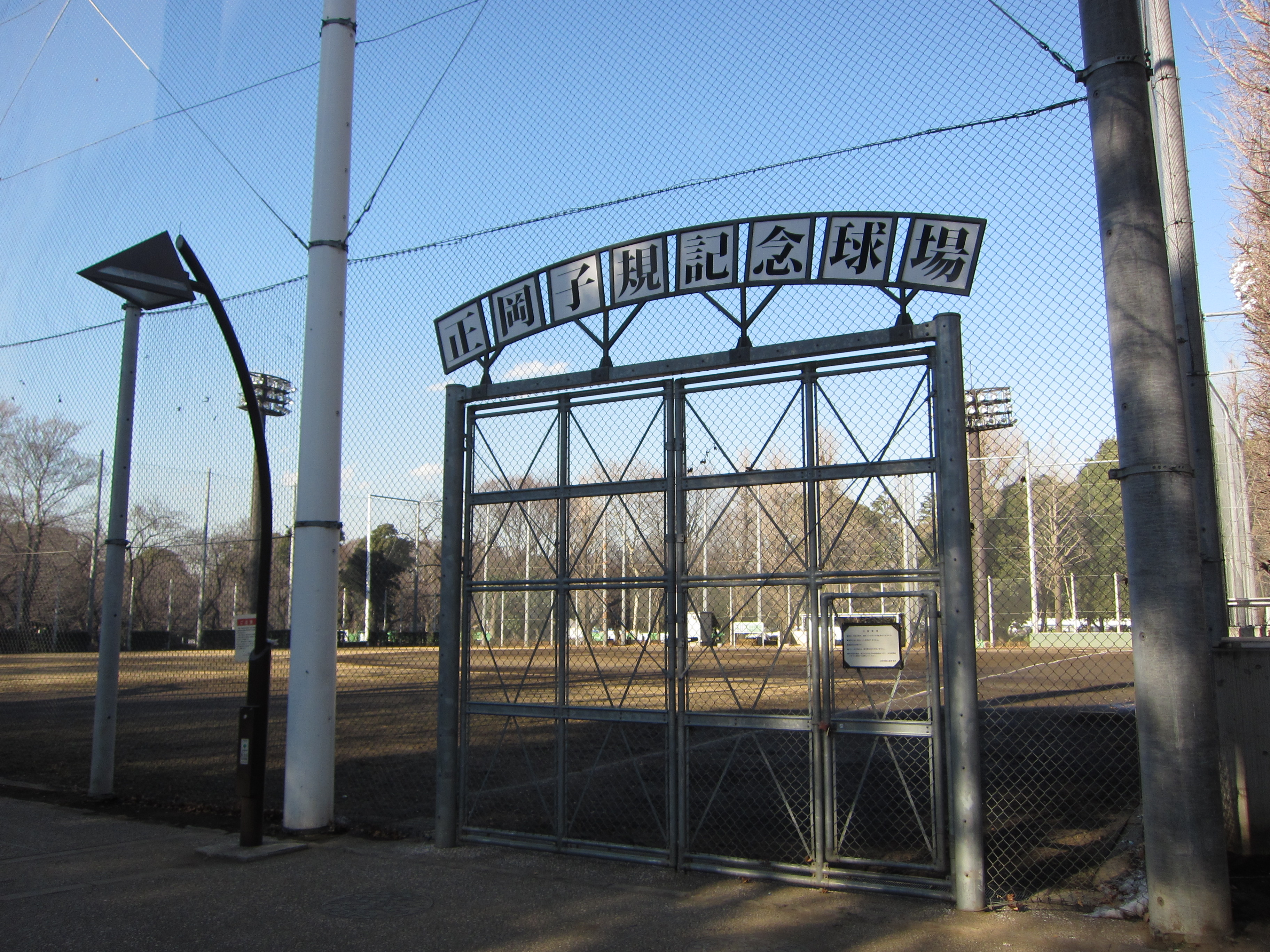 正岡子規記念球場(2012年2月3日撮影)